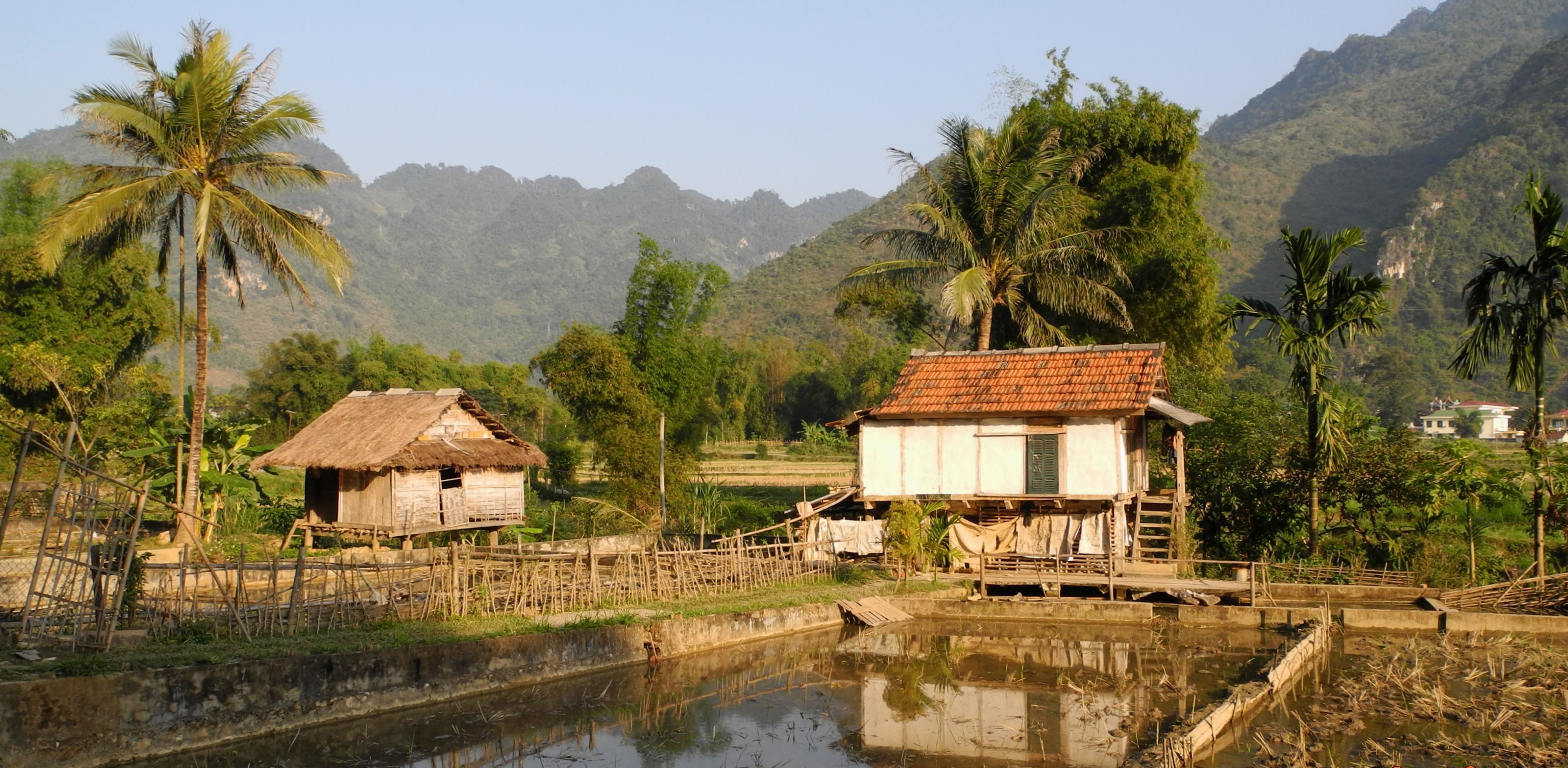 Mai Chau - Häuser im Reisfeld